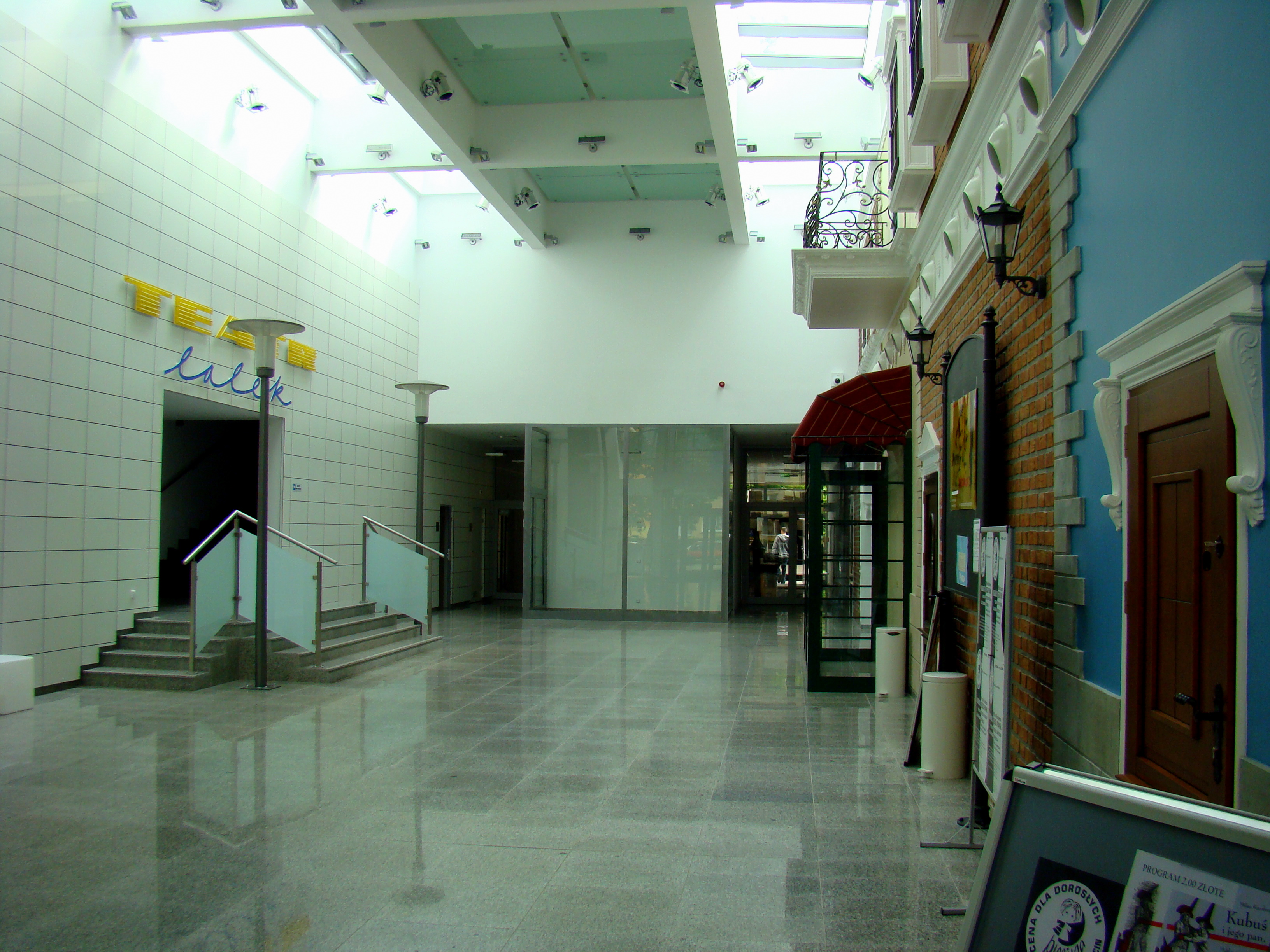 Teatr Lalek Pleciuga (hol główny), Szczecin, Polska